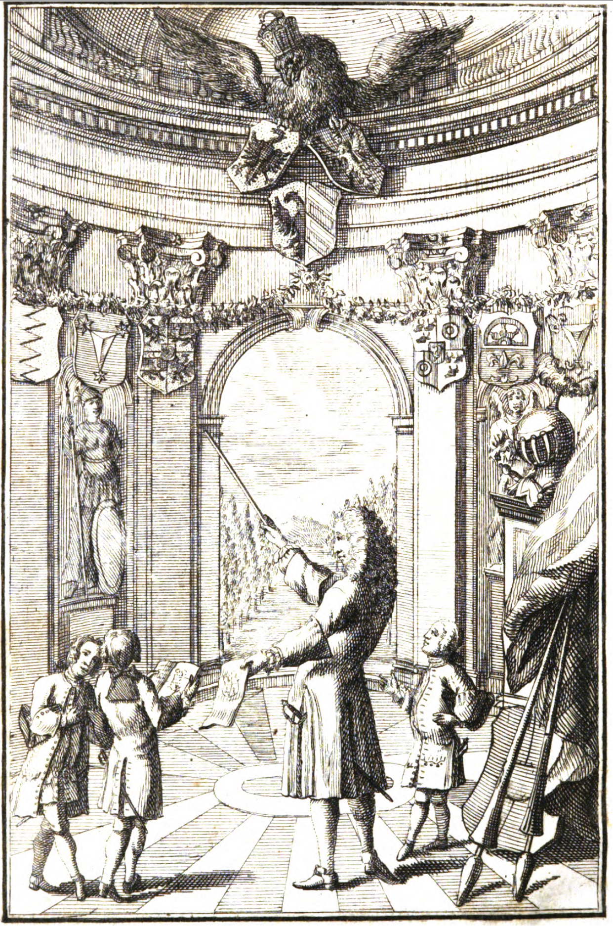 Sebastian Jacob Jugendres heraldikai művének grafikus címlapja, hieroglifikus jelképekkel